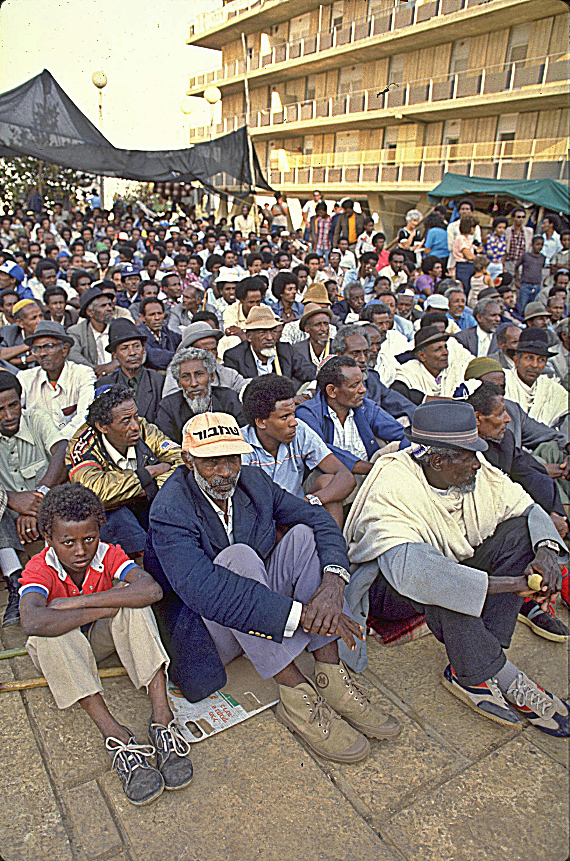 ETHIOPIAN IMMIGRANTS DEMONSTRATING IN FRONT OF THE CHIEF RABBINITE IN JERUSALEM, AGAINST THE RABBINITES REFUSAL TO RECOGNIZE THEM AS JEWS. מהגרים אתיופים מפגינים בירושלים כנגד סירוב רבנים להכיר בהם כיהודים. Photograph: HARNIK NATI, GPO. 02/10/1985